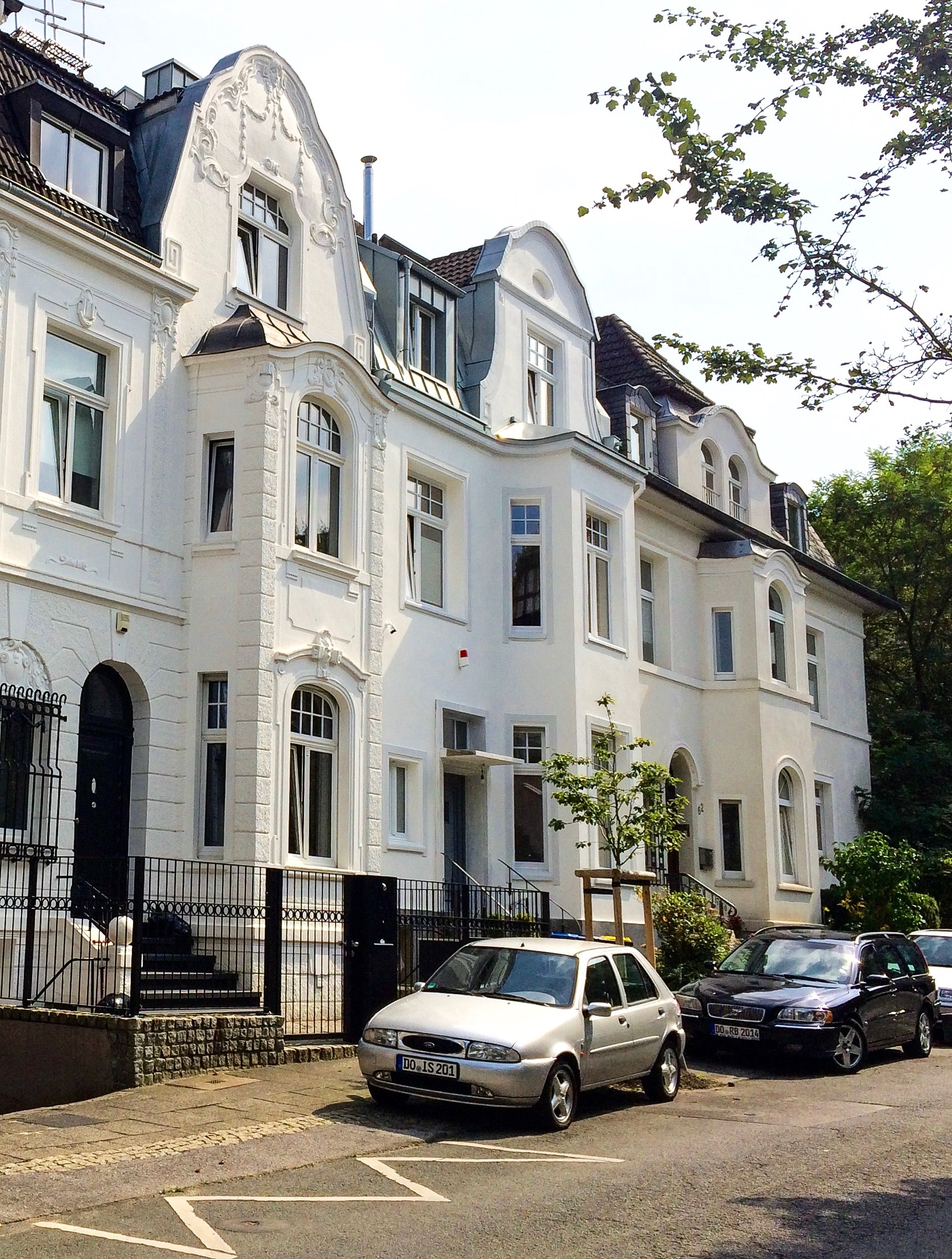 Stadtvillen im Kaiserviertel, Bismarkstraße